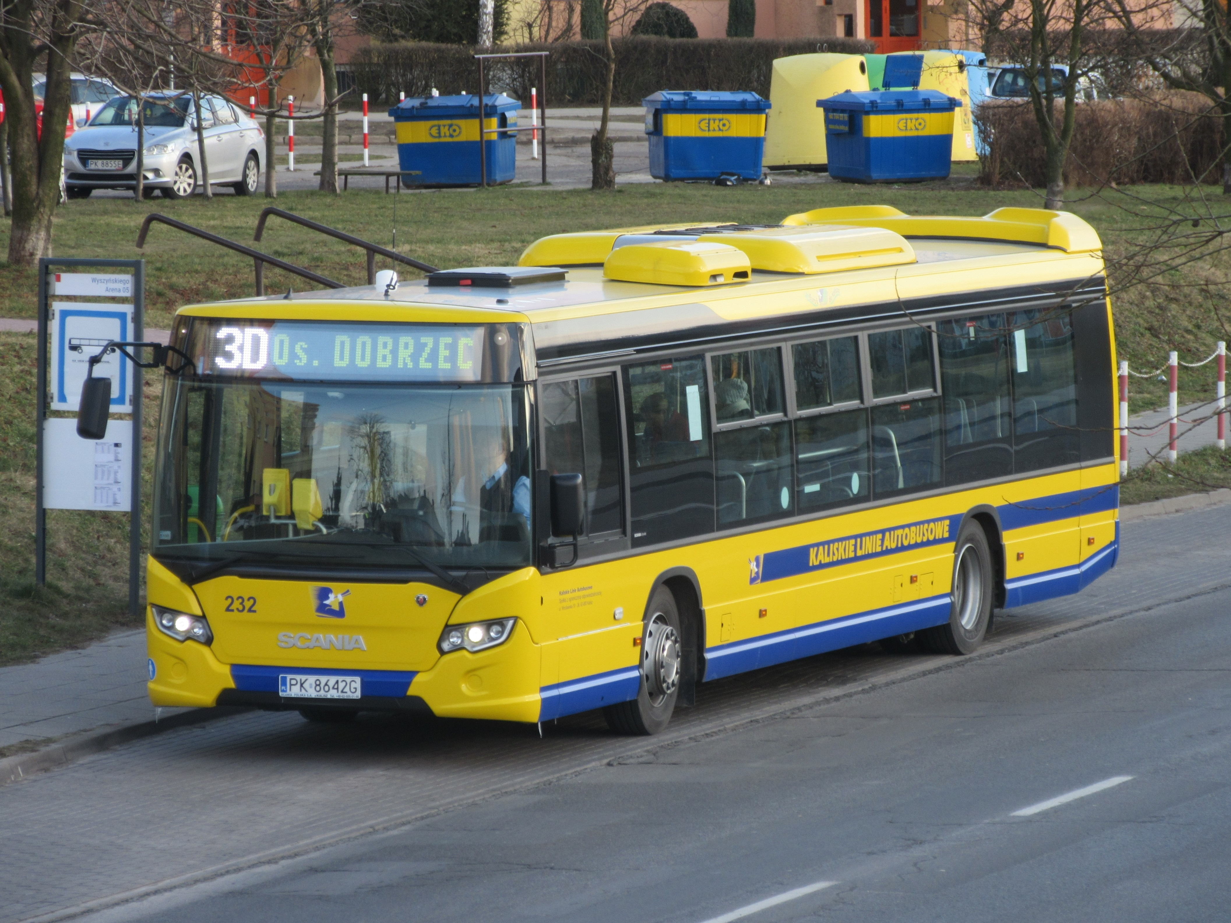 Scania Citywide LF (CN280UB) Kaliskich Linii Autobusowych na przystanku Wyszyńskiego Arena w Kaliszu